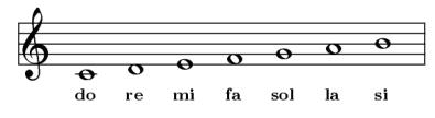 Sol klabeko notak